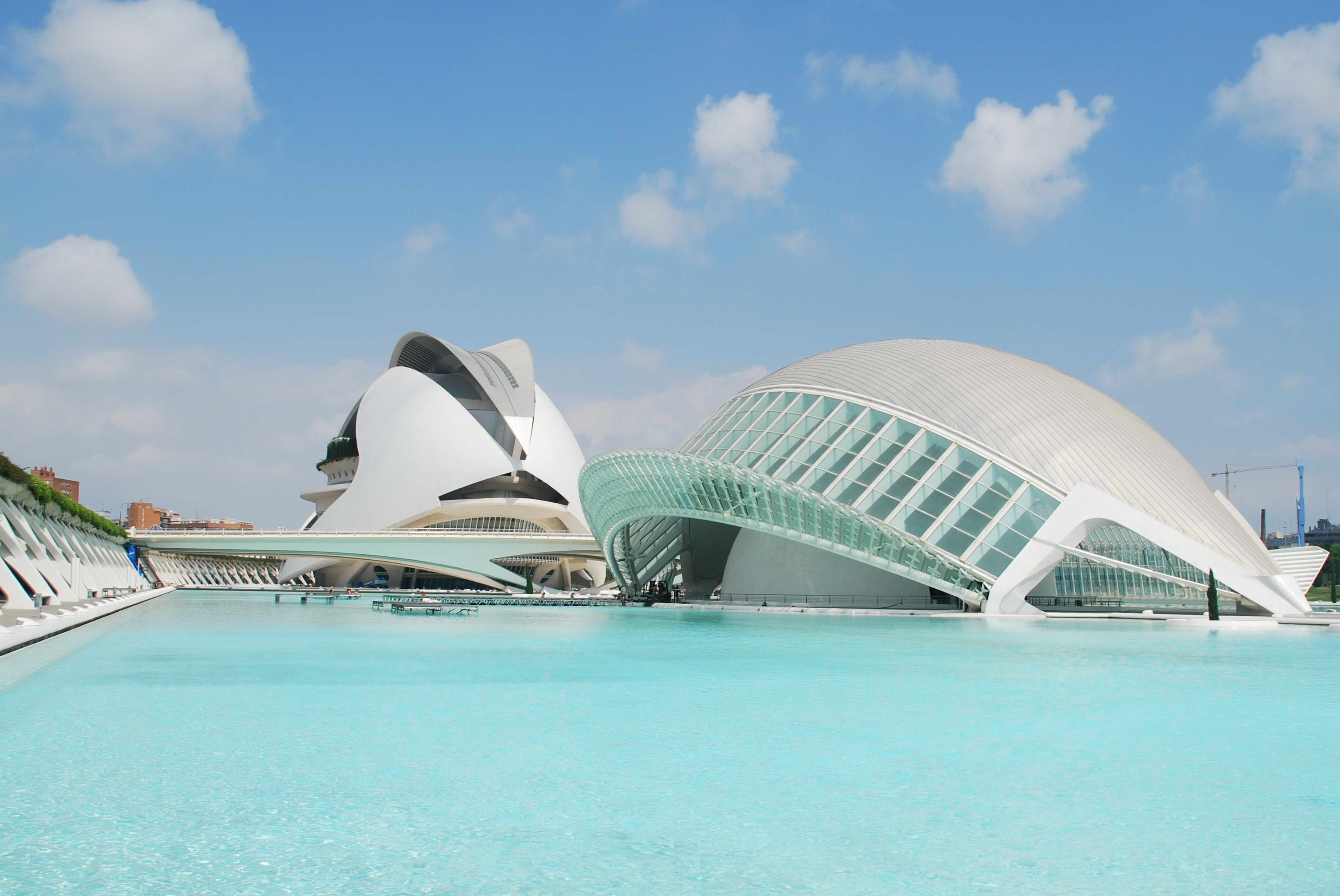 La Ciudad de las Artes y las Ciencias de Valencia.